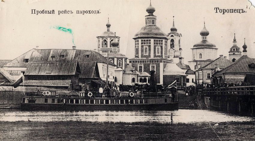 Воскресенский храм и другие памятники торопецкого барокко